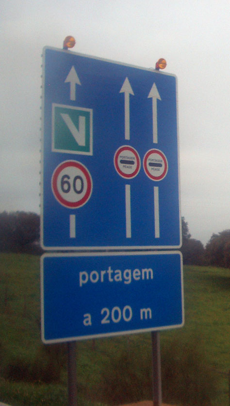 Señal de tráfico portuguesa tomada por mí en la autoestrada A6 (Caia-Marateca), cerca de Borba (si mal no recuerdo). Esta foto fue tomada el 25 de marzo de 2006.